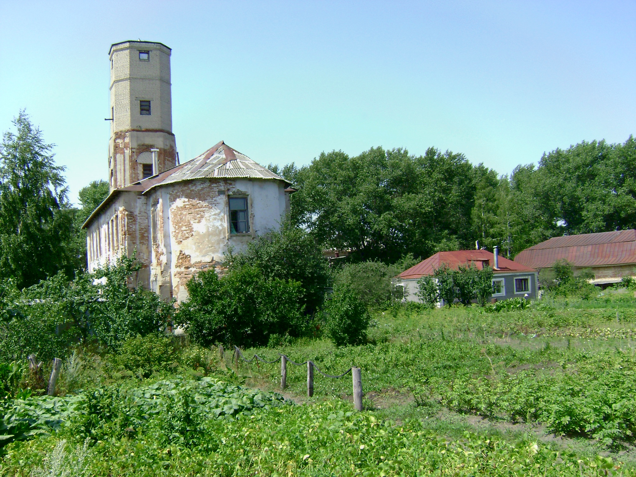 Покровская церковь в Горожанке (Рамонский район, Воронежская обл., Россия). Вид с восточной стороны.